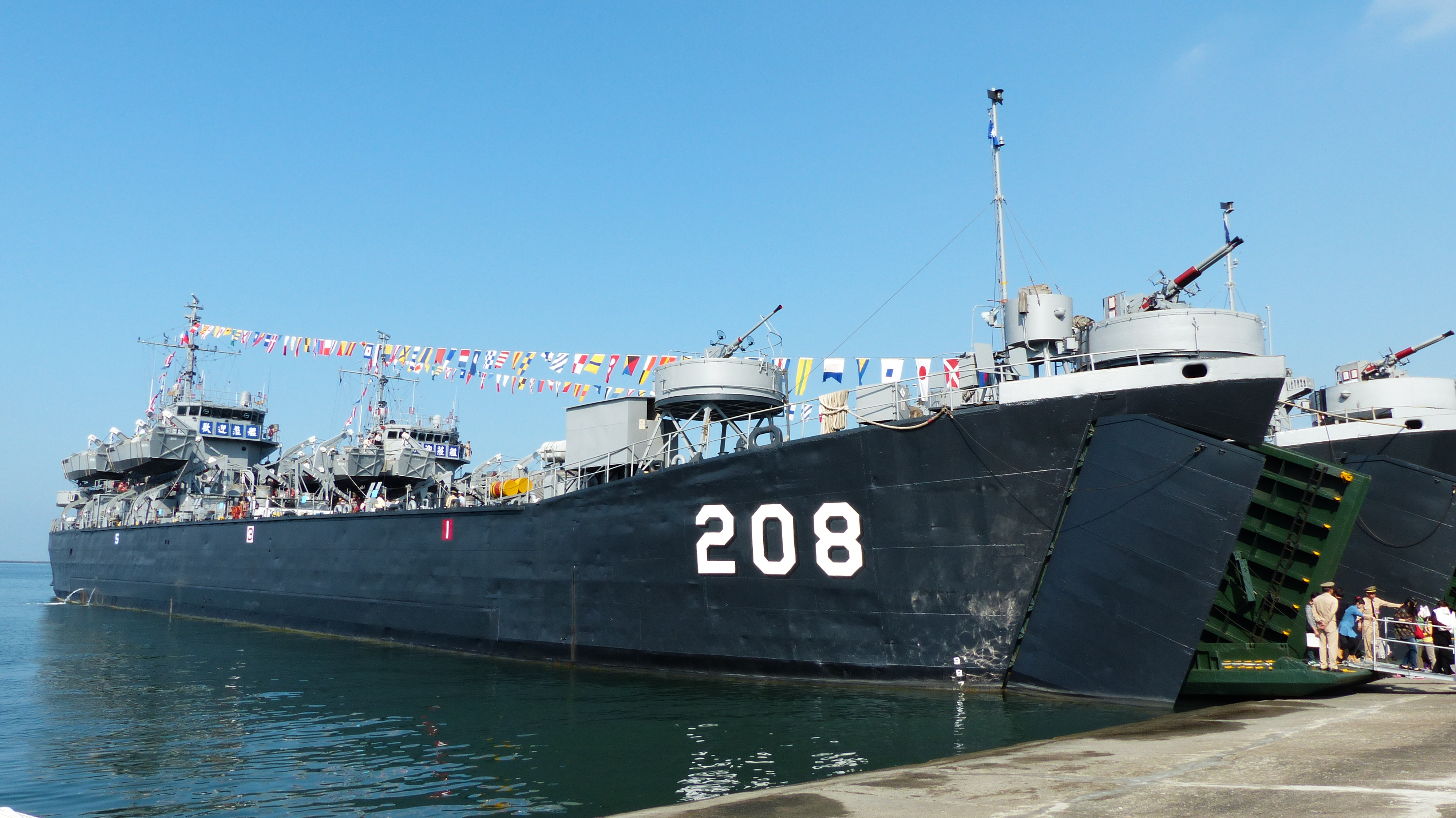 2014年左營軍港營區開放活動，展示中的戰車登陸艦中訓（LST-208）。